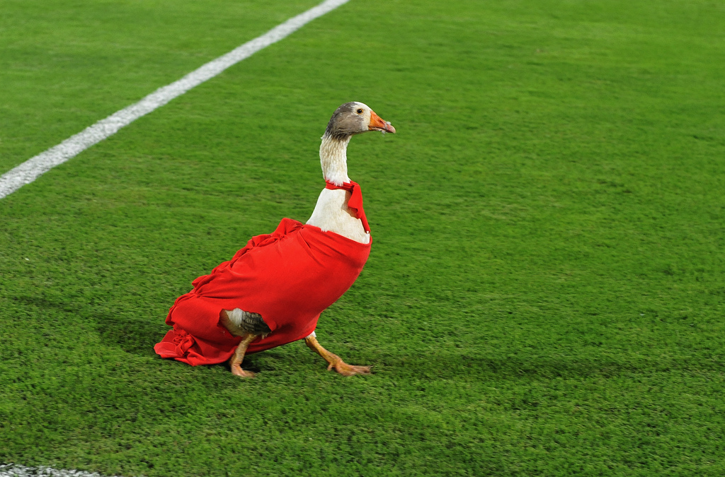 Mascotte du Wydad